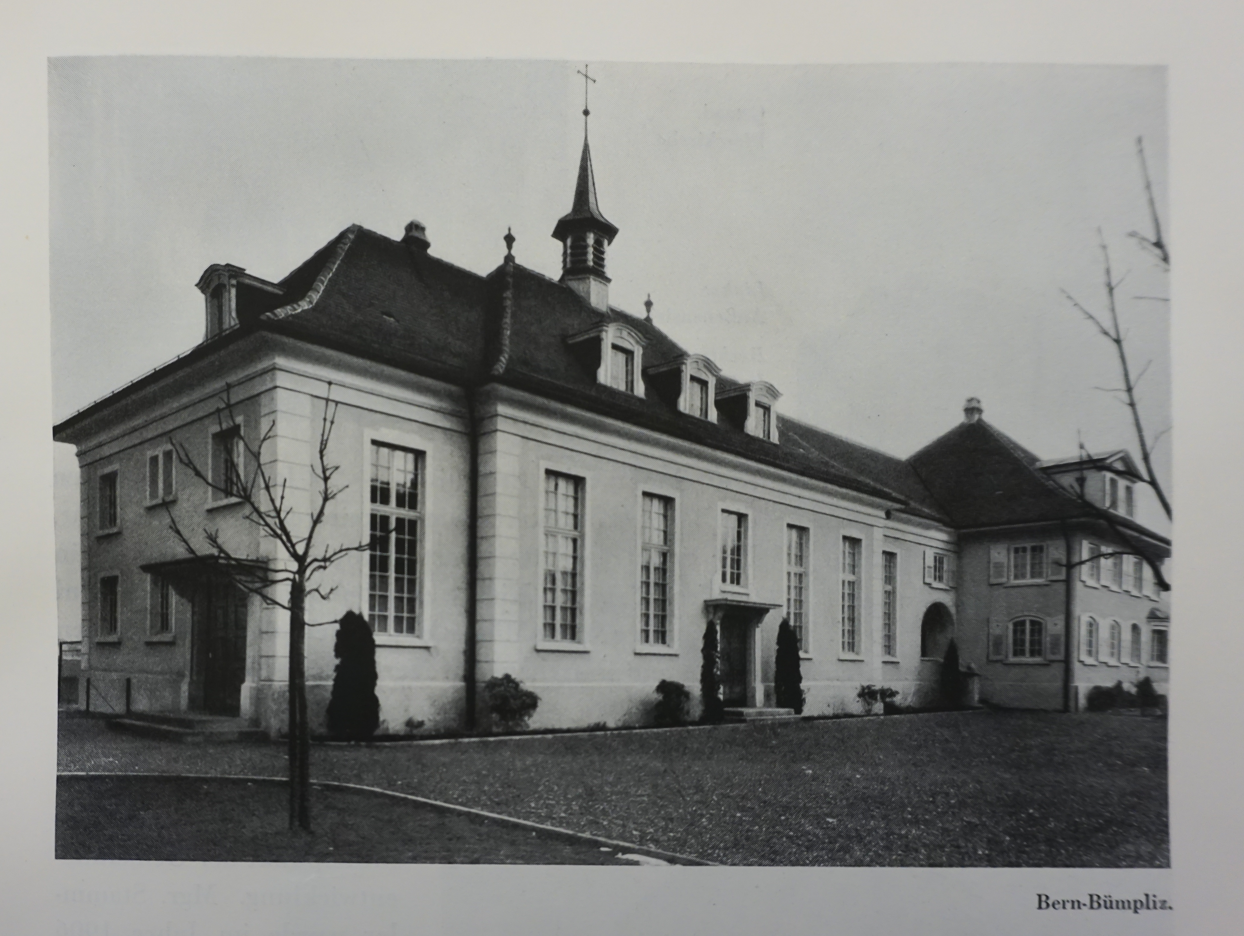 Vorgängerbau von St. Antonius Bümpliz. Architekt Henry B. von Fischer